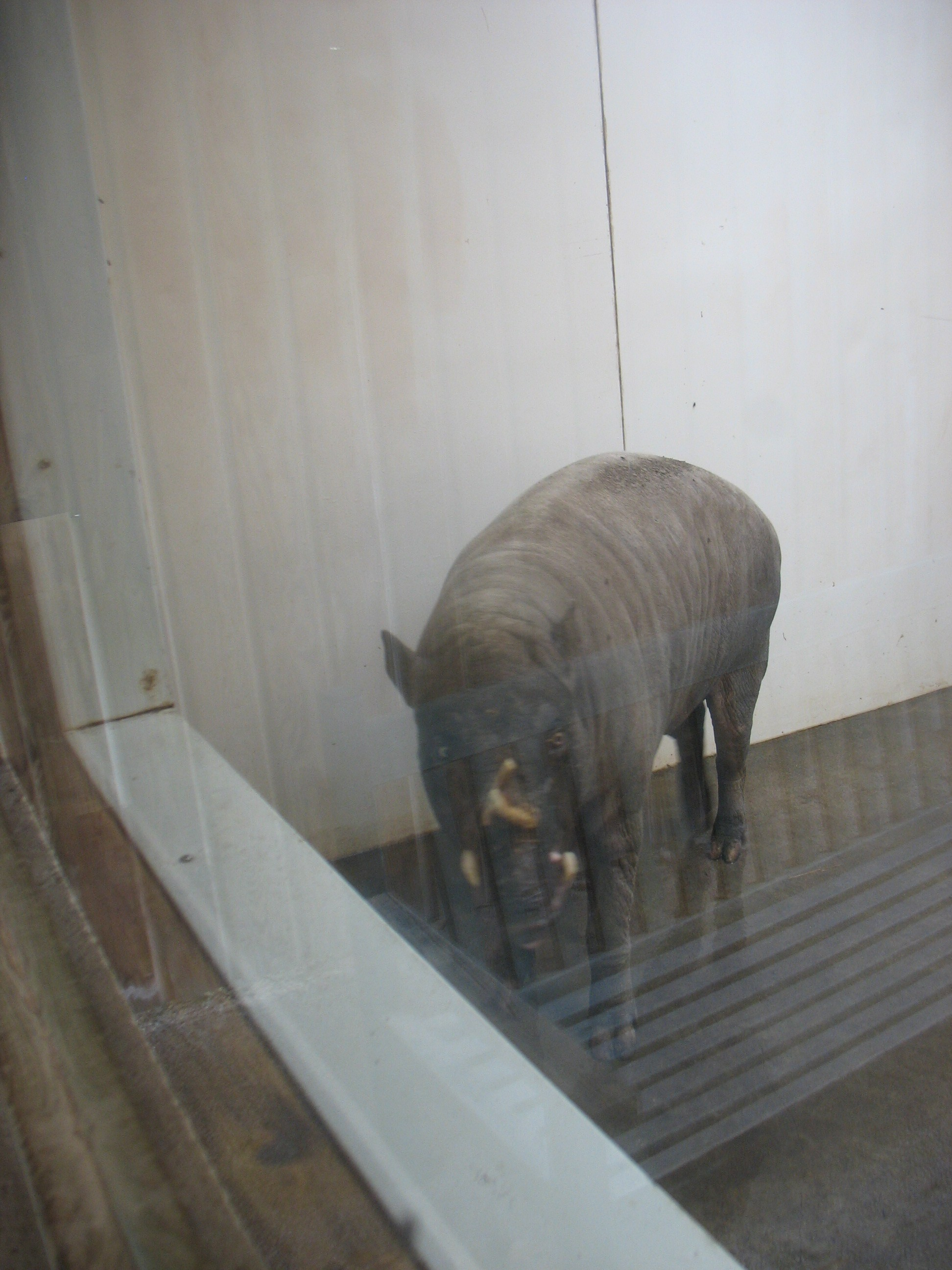 Un Babiroussa au Parc zoologique de Champrepus (France)